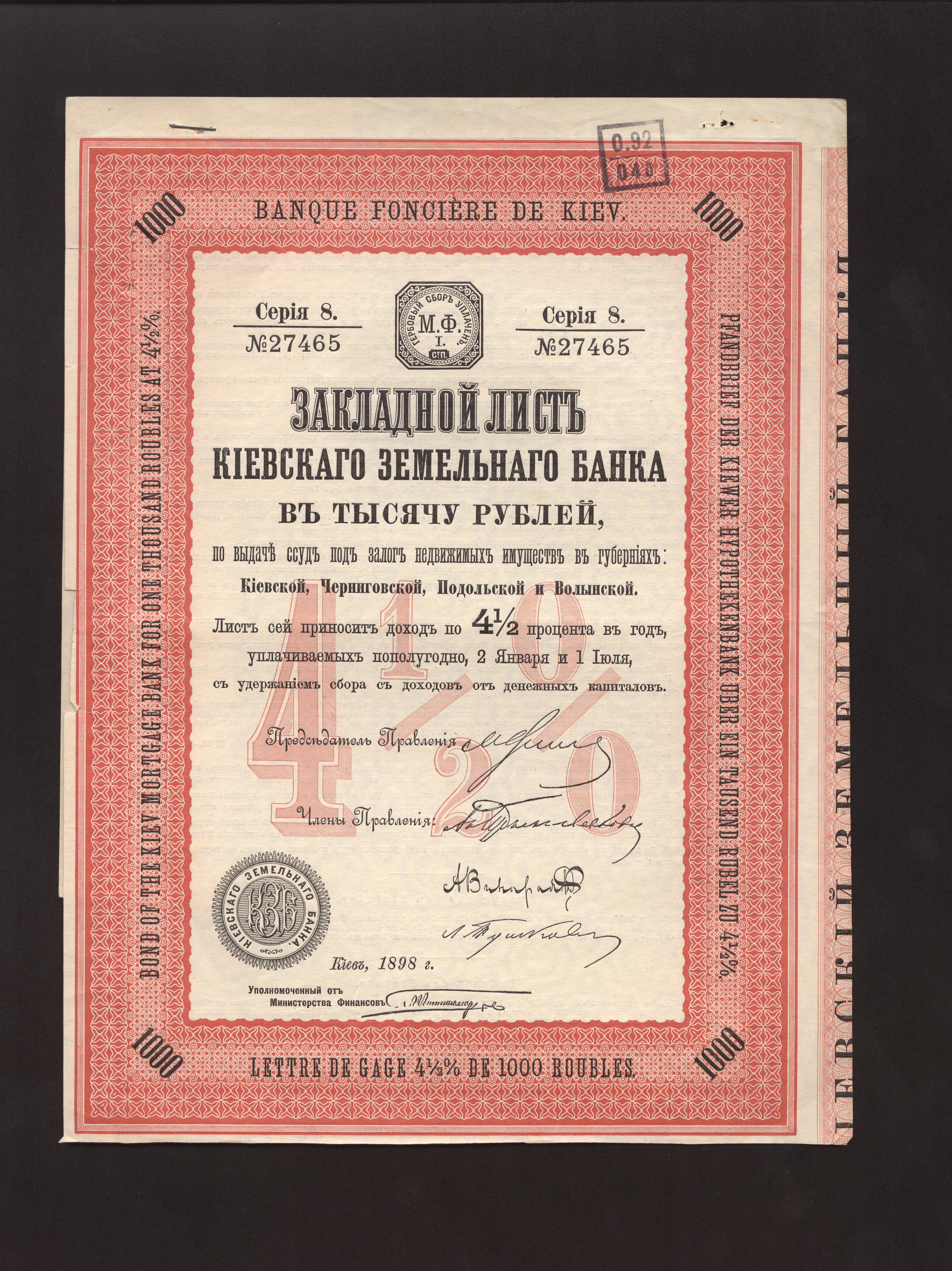 Закладной лист в тысячу руб. Киевского земельного банка. Киев, 1898 г.